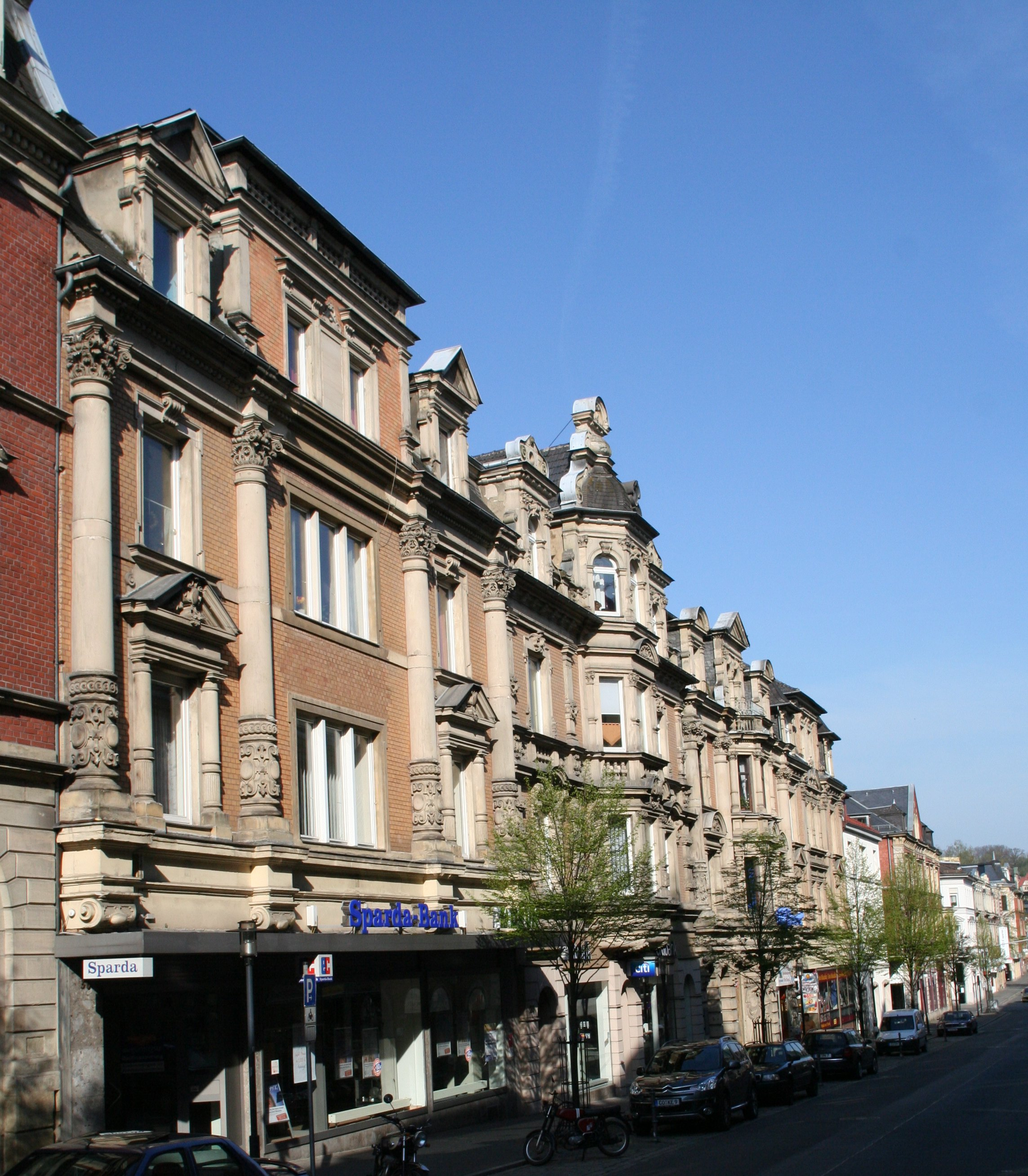 Coburg, Mohrenstraße 24-30